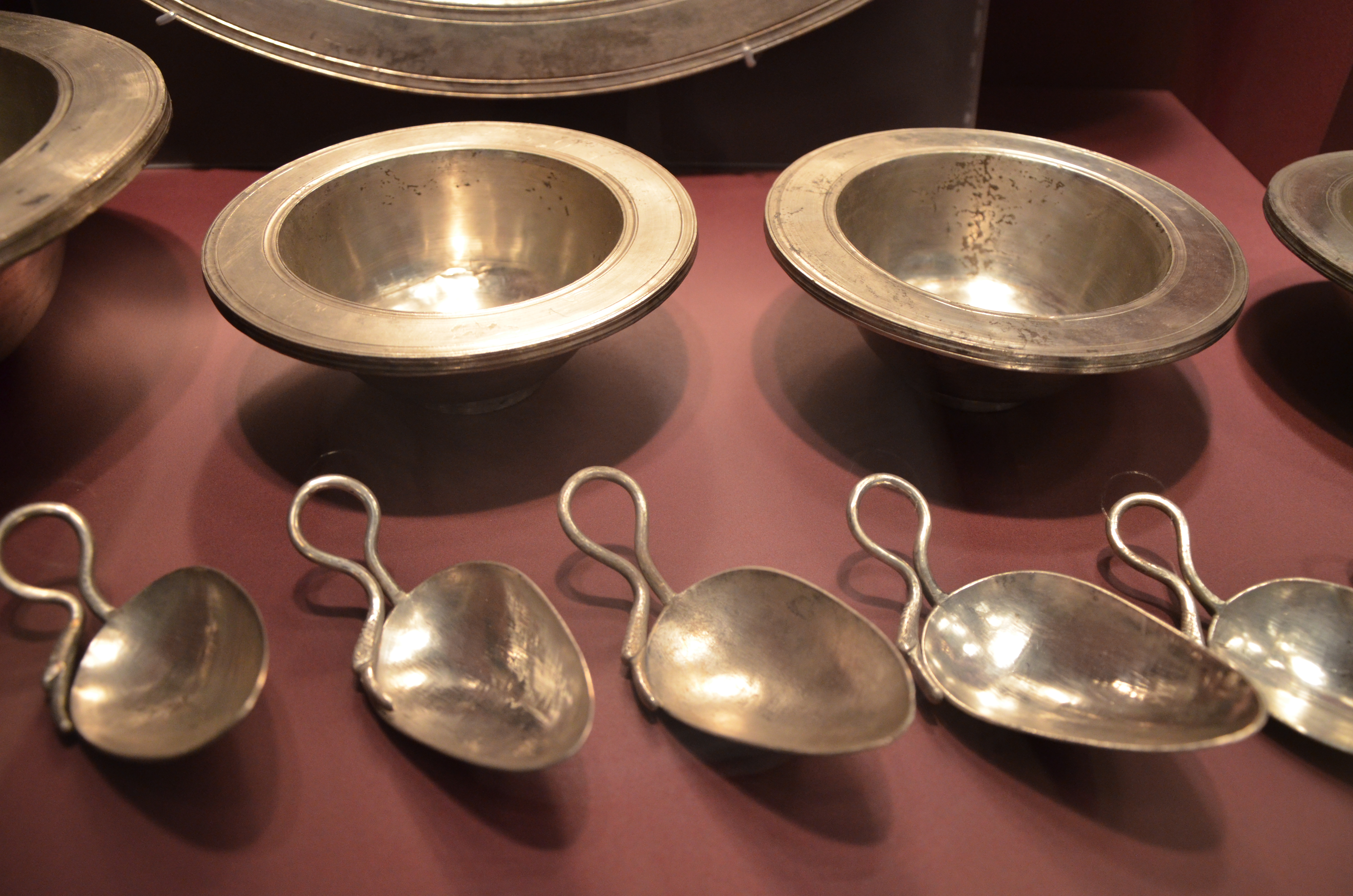 Augusta Raurica, Switzerland